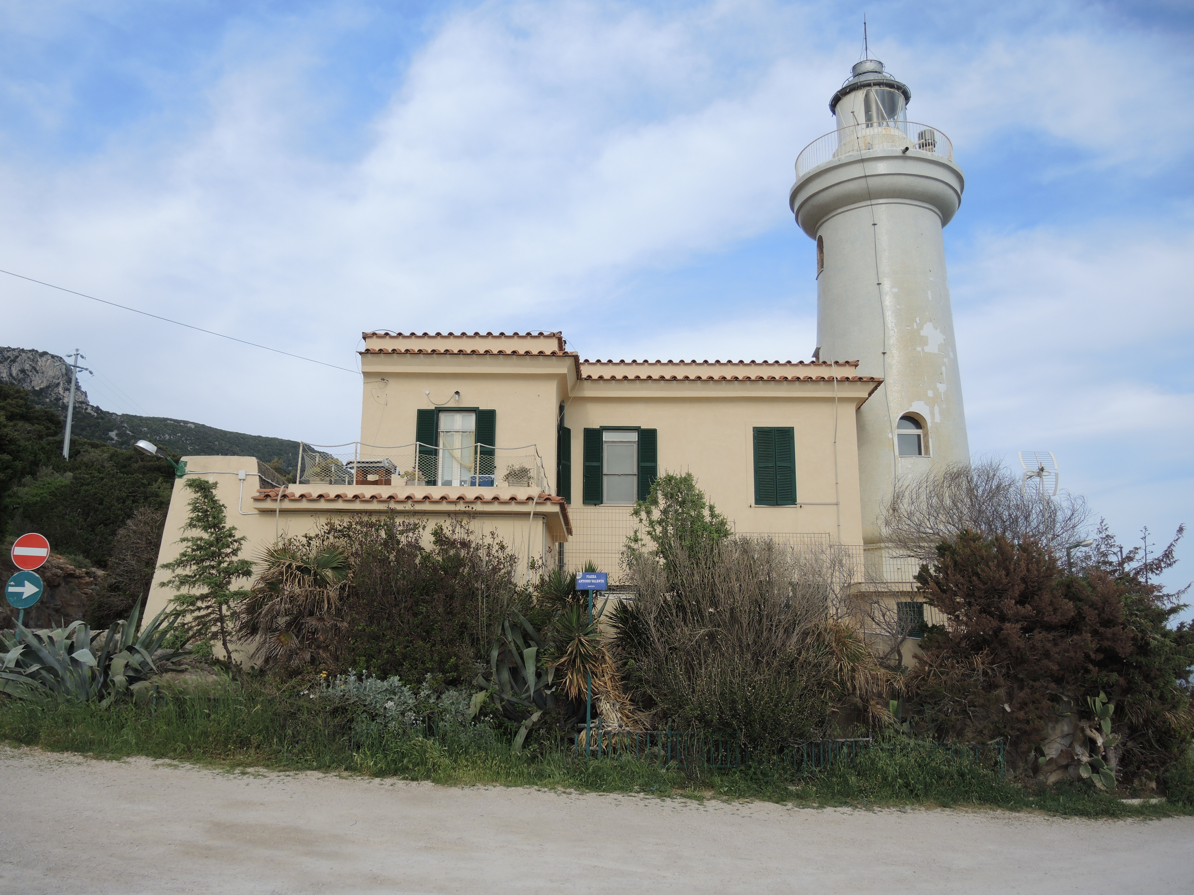 Faro di Capo Circeo